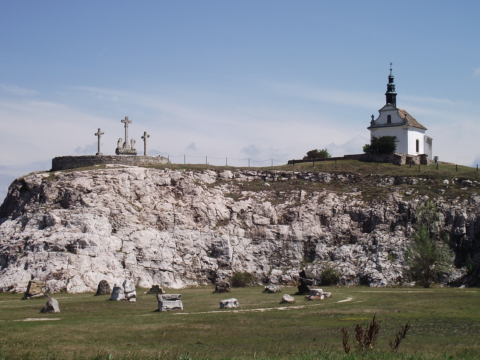 Kálvária kápolna és Kálvária szobrok. (Tata, Kálváriadomb) This is a photo of a monument in Hungary, Identifier: 6432 This is a photo of a monument in Hungary, Identifier: 6433